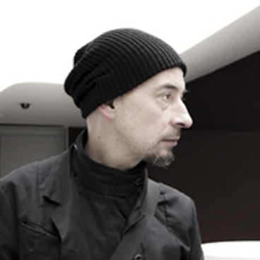 Der Maler Christian Riebe 2016 im Sprengelmuseum Hannover